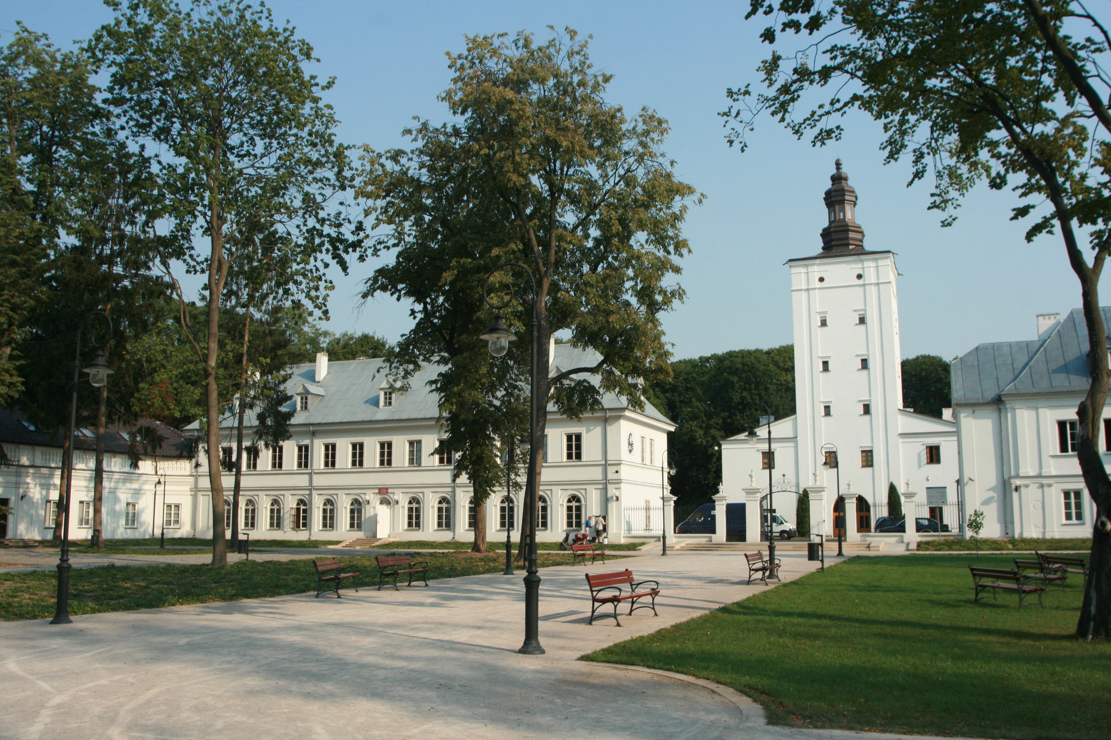 Biala Podlaska, Poland